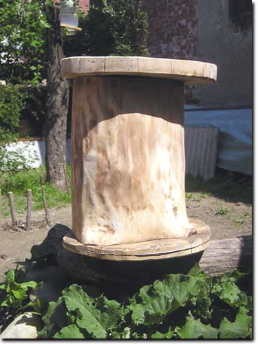 Dubina - košnica iz šupljeg debla